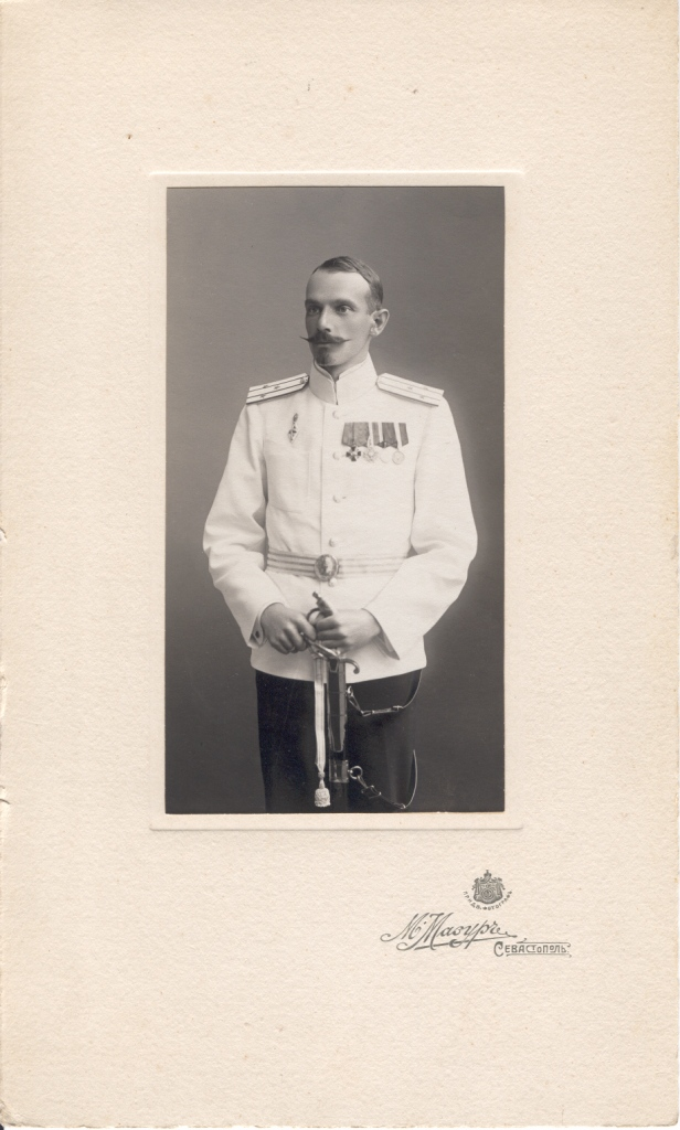 Vadym Bogomolets (1878-1936)